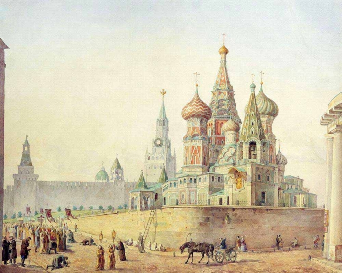 Рабус Карл Иванович - Храм Василия Блаженного